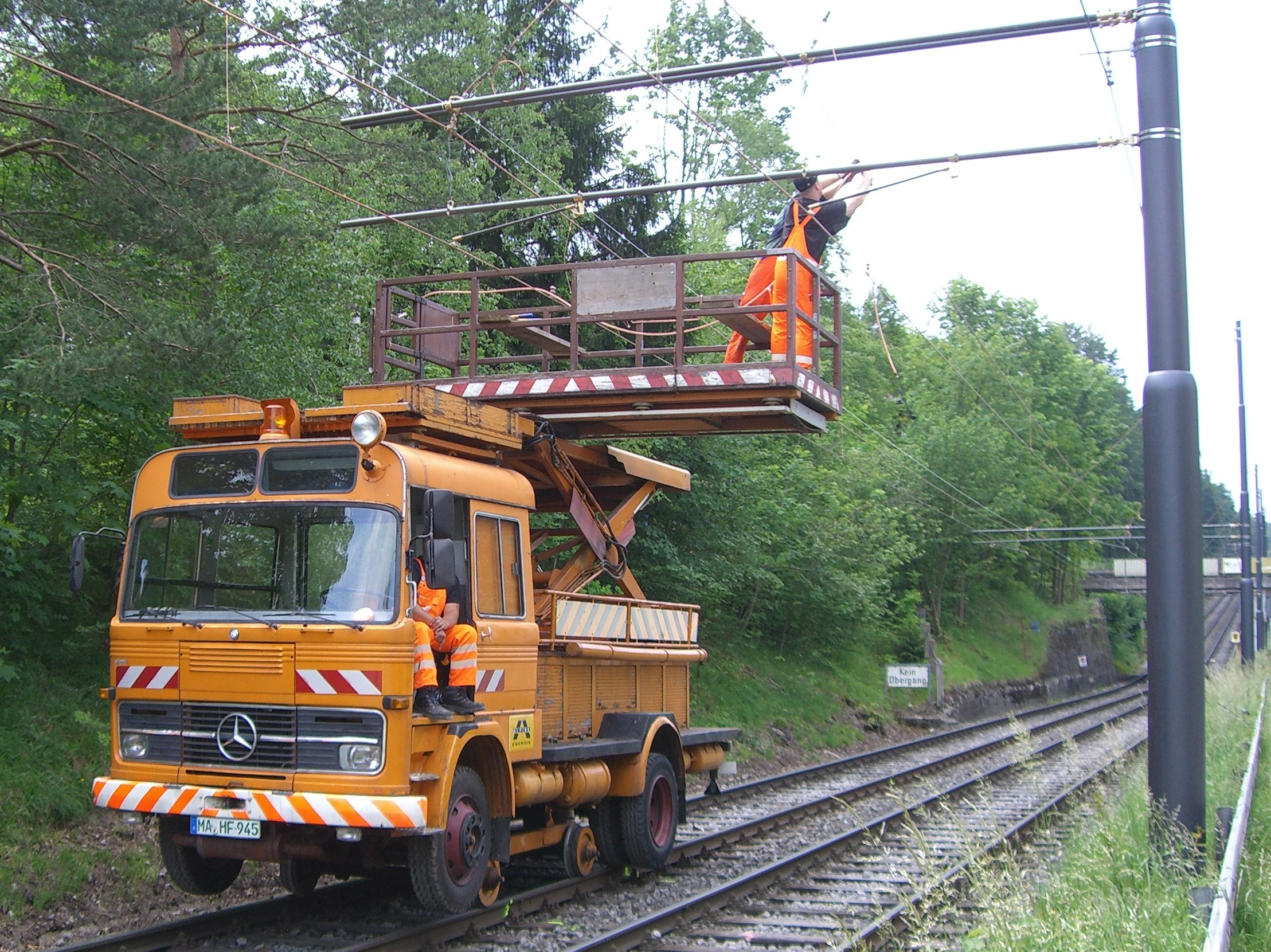 Mercedes Benz-Zweiwegfahrzeug für die Fahrleitungsmontage